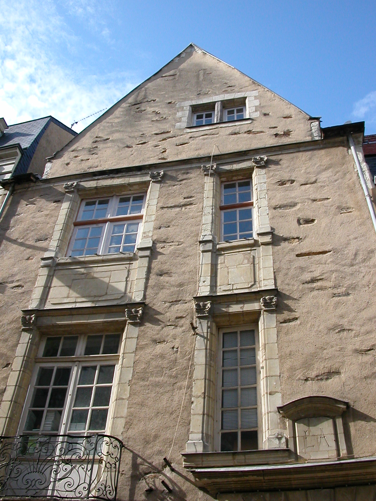 Immeuble à Angers, place du Pilori.